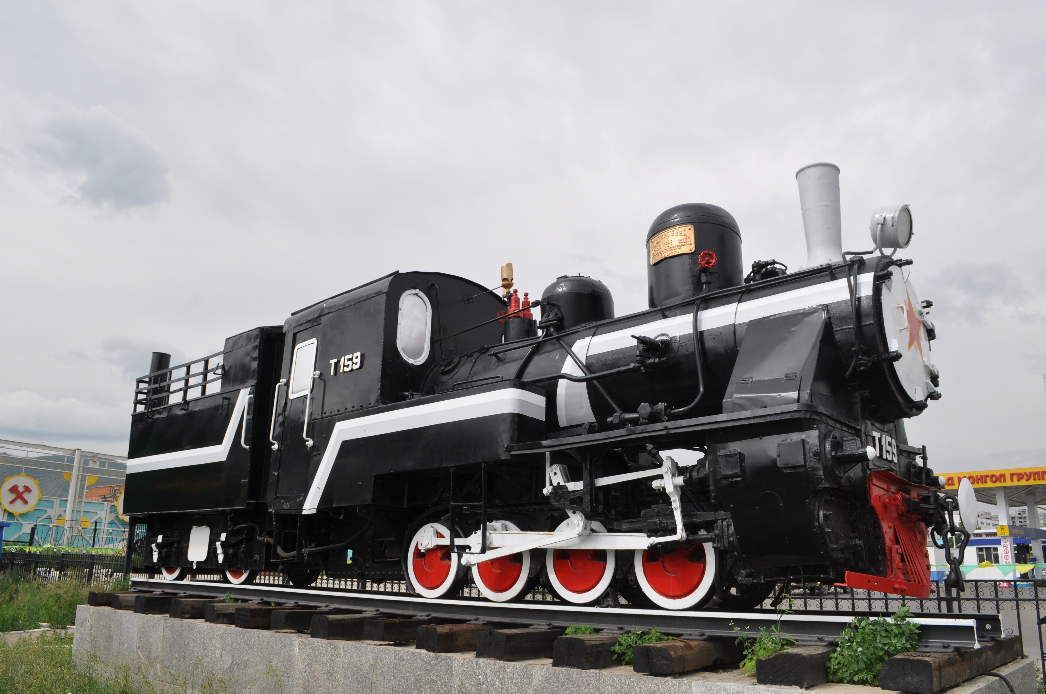 узкоколейный паровоз коломенского завода тип 159. Музей жд транспорта в Улан-Баторе